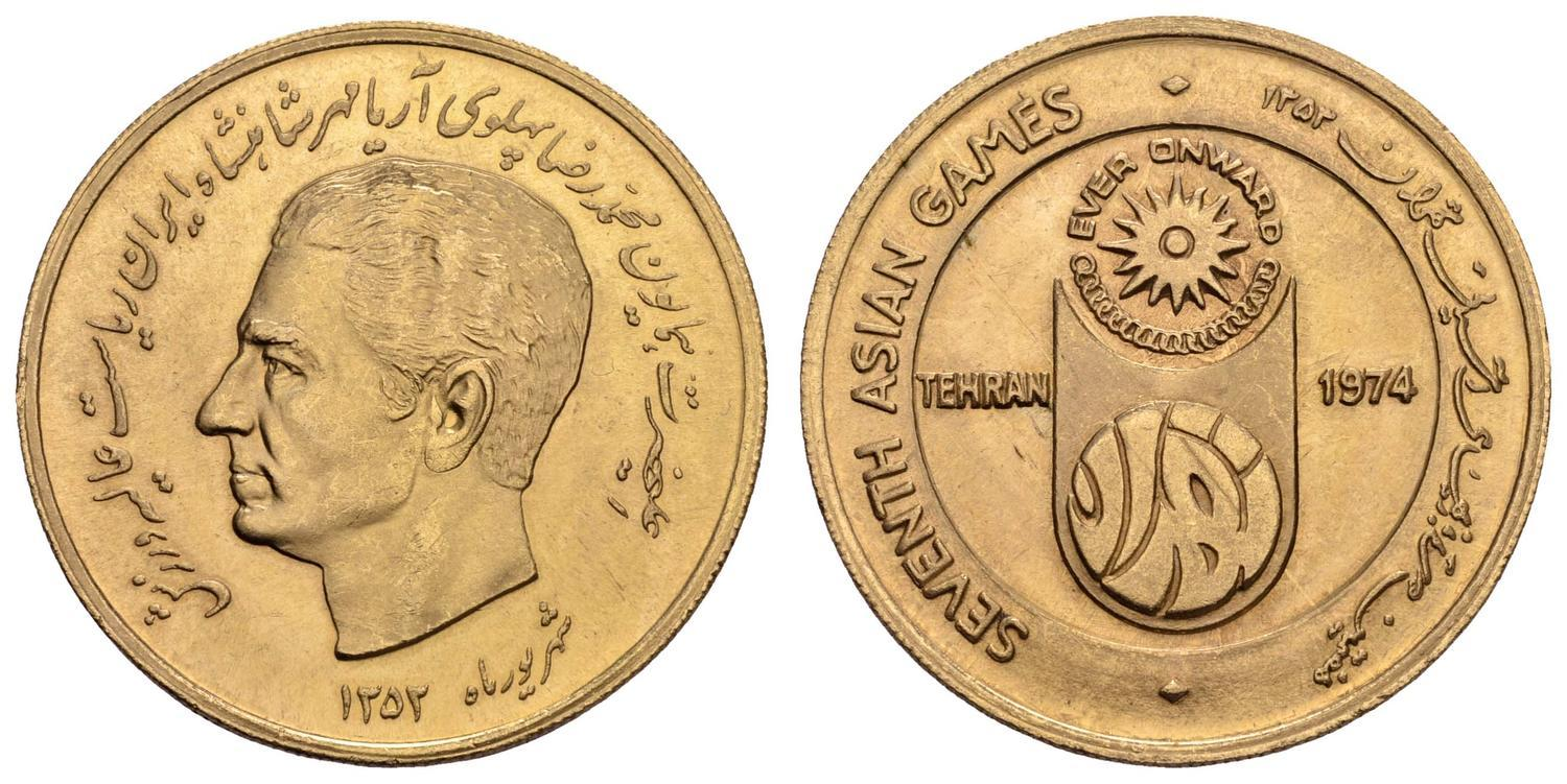 مدال طلا بمناسبت هفتمین دوره بازیهای آسیائی تهران بوزن ۳۳ گرم